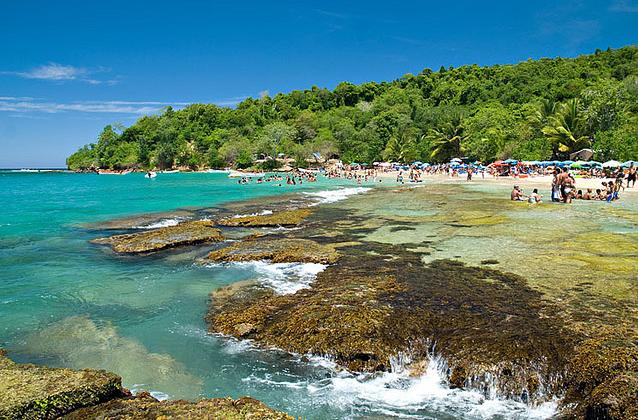 El turismo en el estado vargas, venezuela